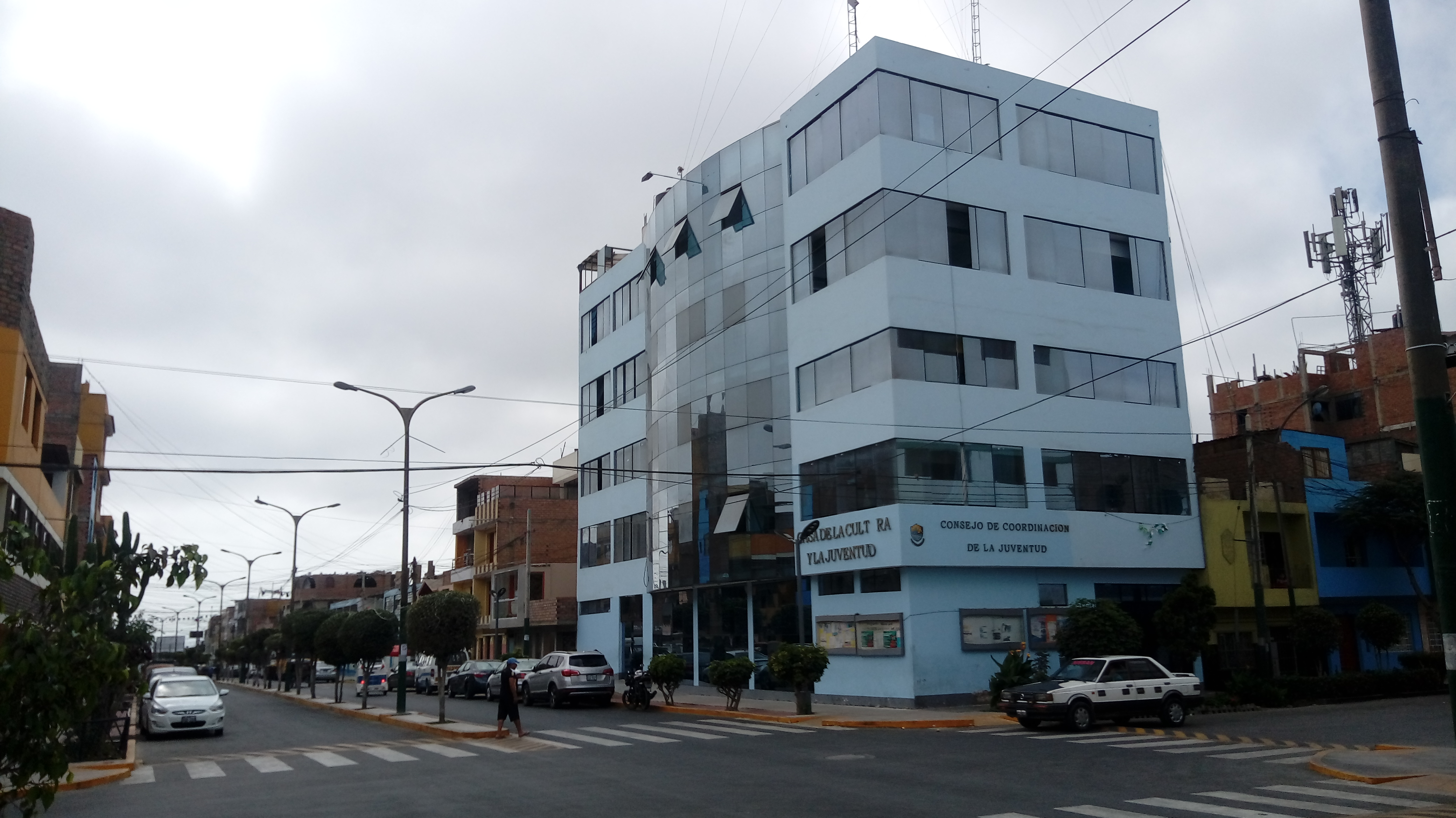 Edificio de la casa de la juventud en Carmen de la Legua Reynoso